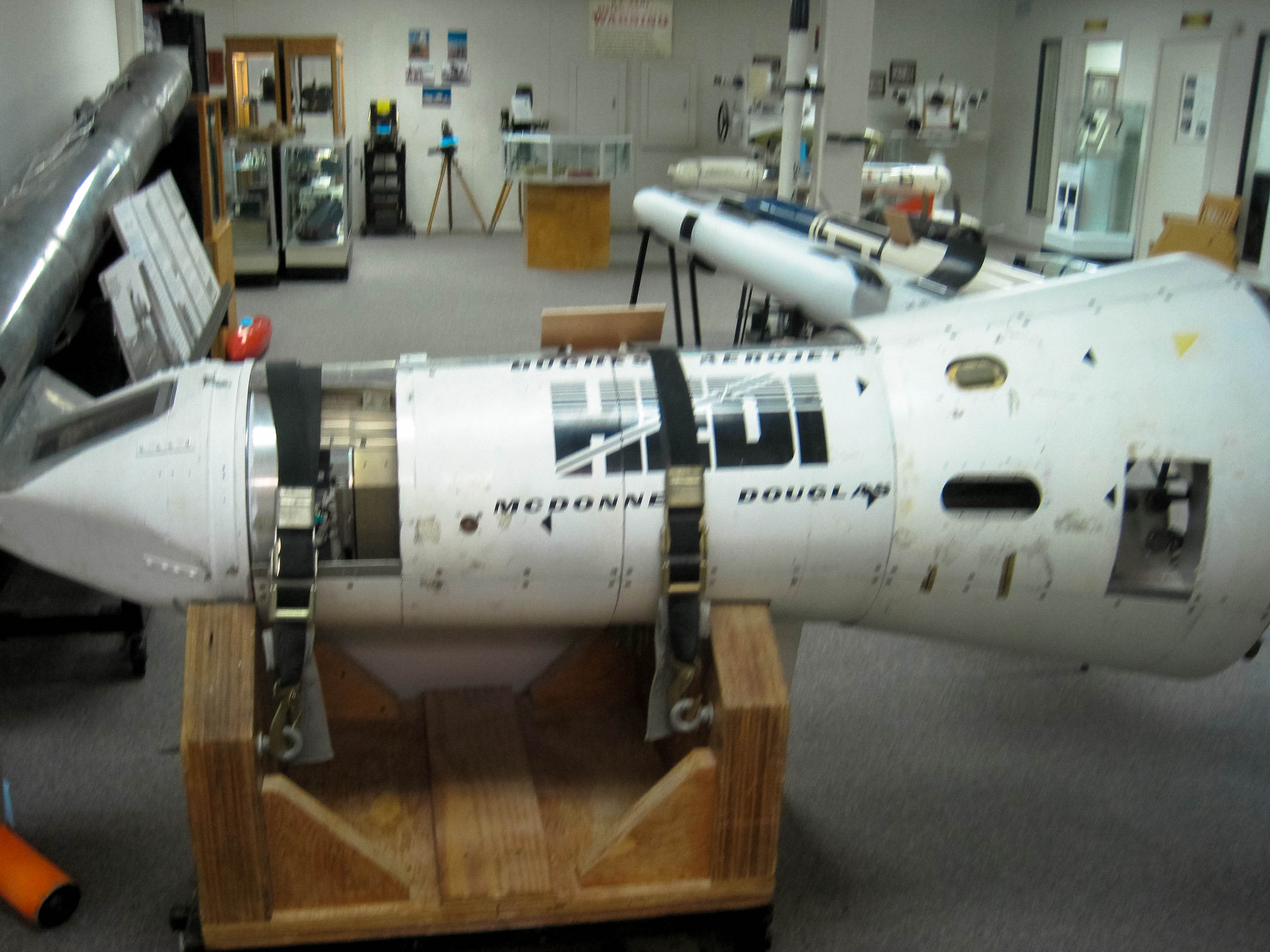 White Sands Missile Range Museum-98.jpg